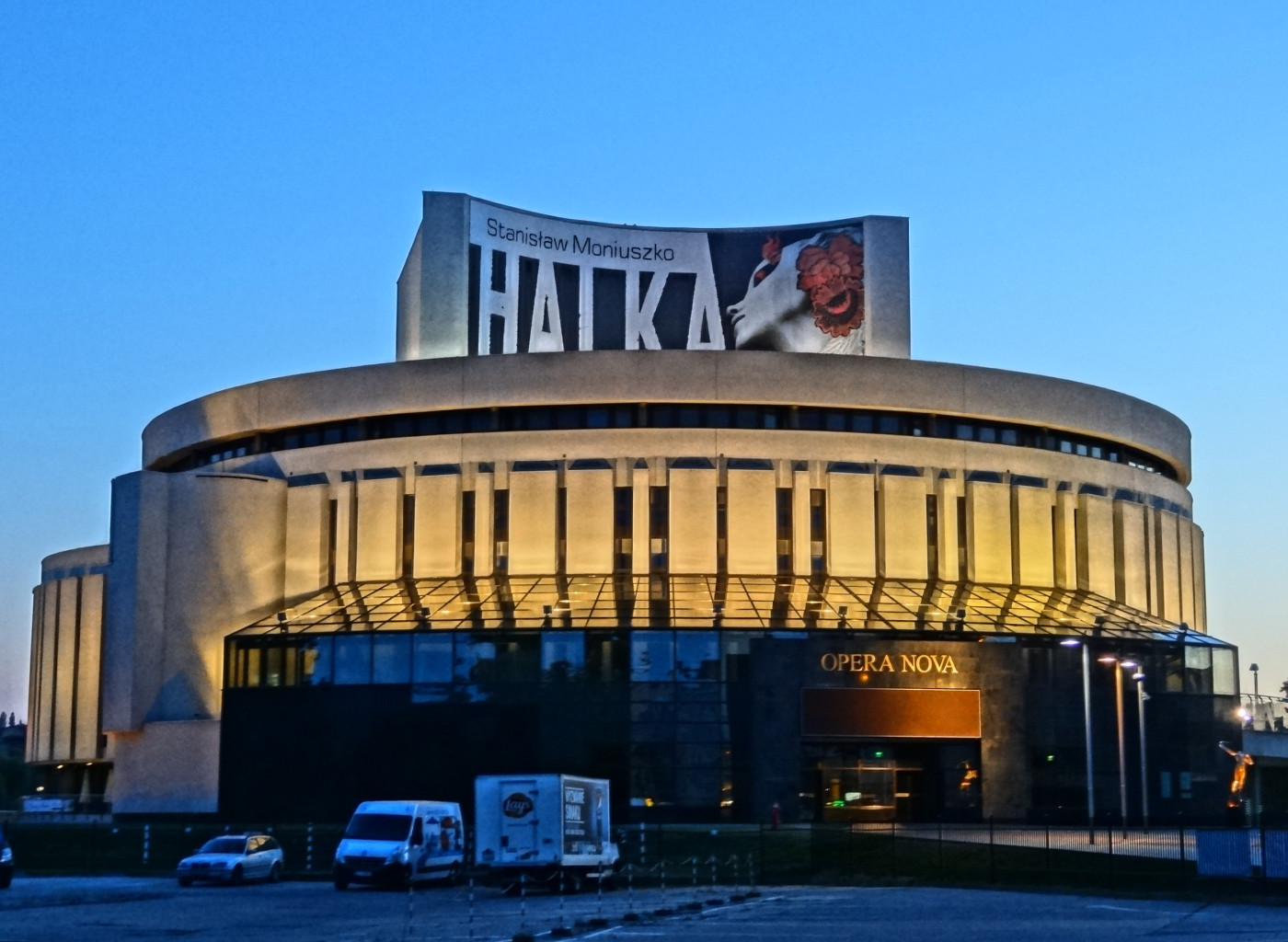 Budynek Opery Nova zbud. w latach 1973-2006, Bydgoszcz ul Ferdynanda Focha 5